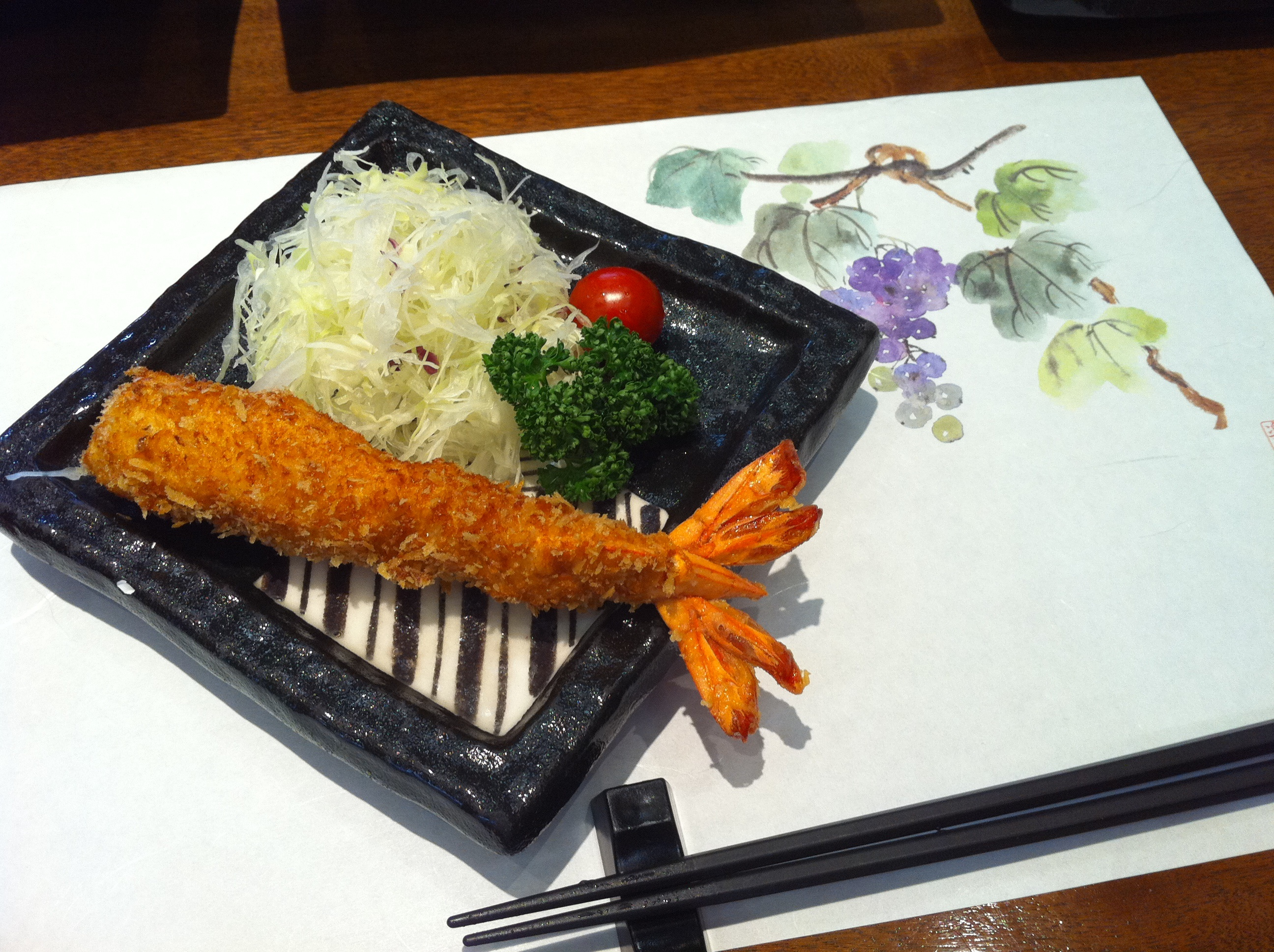 海老フライ